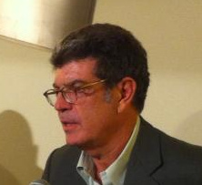 Foto del escritor Juan Bolea tomada en Zaragoza en el año 2013